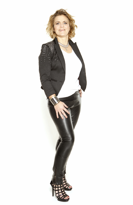 Fredag den 7:e januari är det danspremiär för mig och Tobias Karlsson i TV4´s program Let´s dance! Vi ska göra allt för att dansa oss till final.